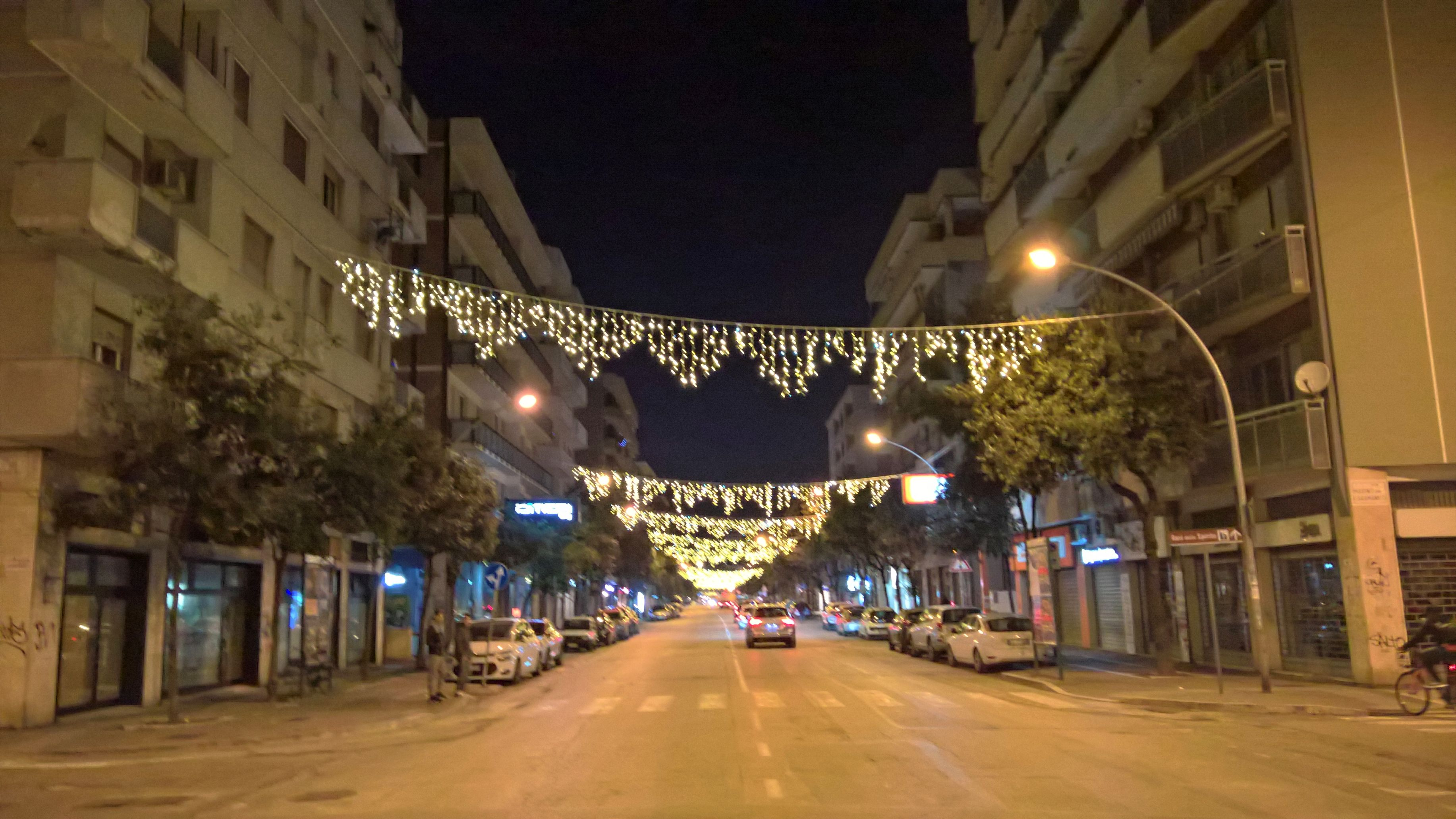 Pescara 2018